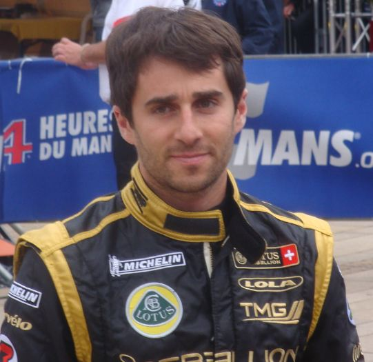 Nicolas Prost au 24h du Mans 2012